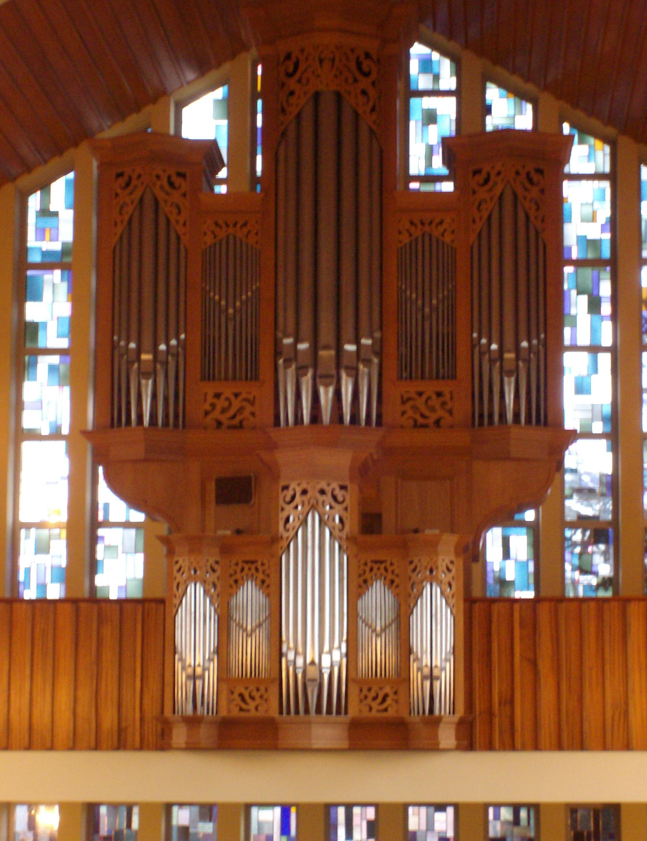 Orgel der altreformierten Kirche Bunde (Ostfriesland), Frontansicht